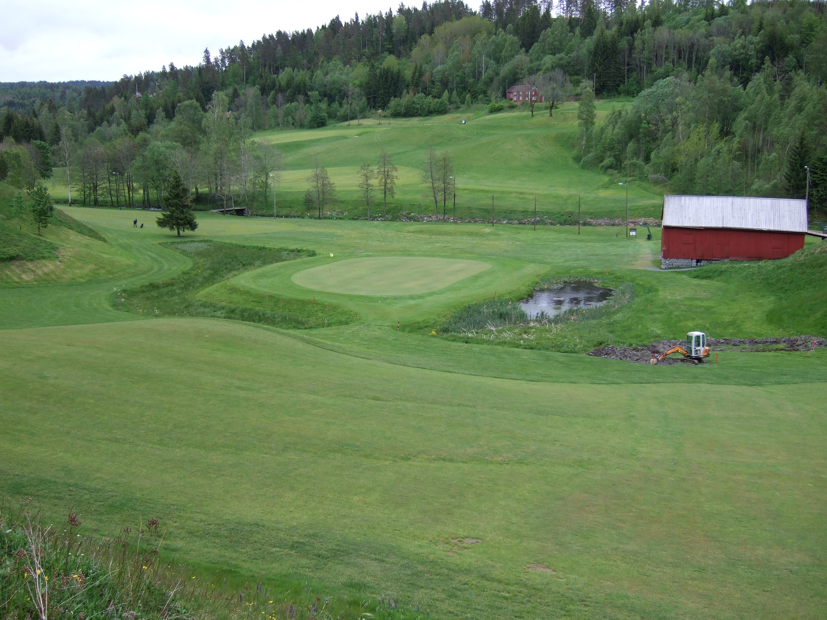 "Arendalog omegn golfklubb". Part of area